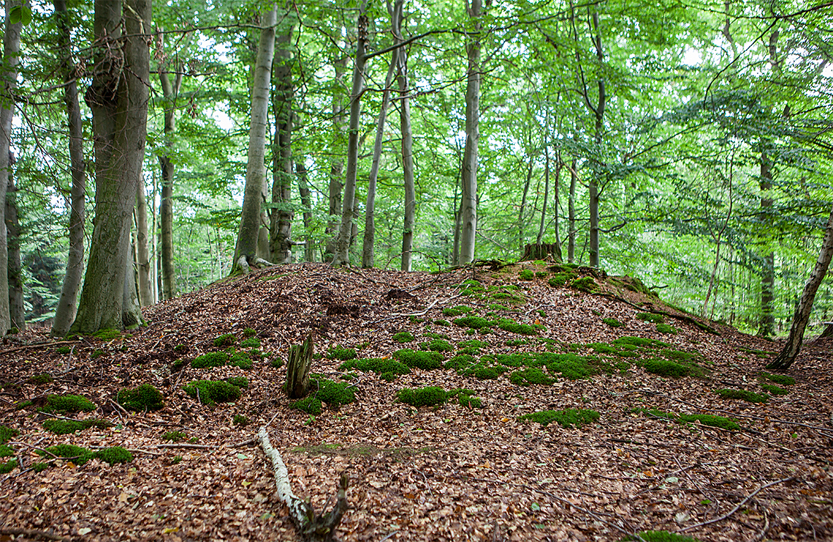 Grabhügel auf dem Haiberg bei Kalldorf (Kalletal)